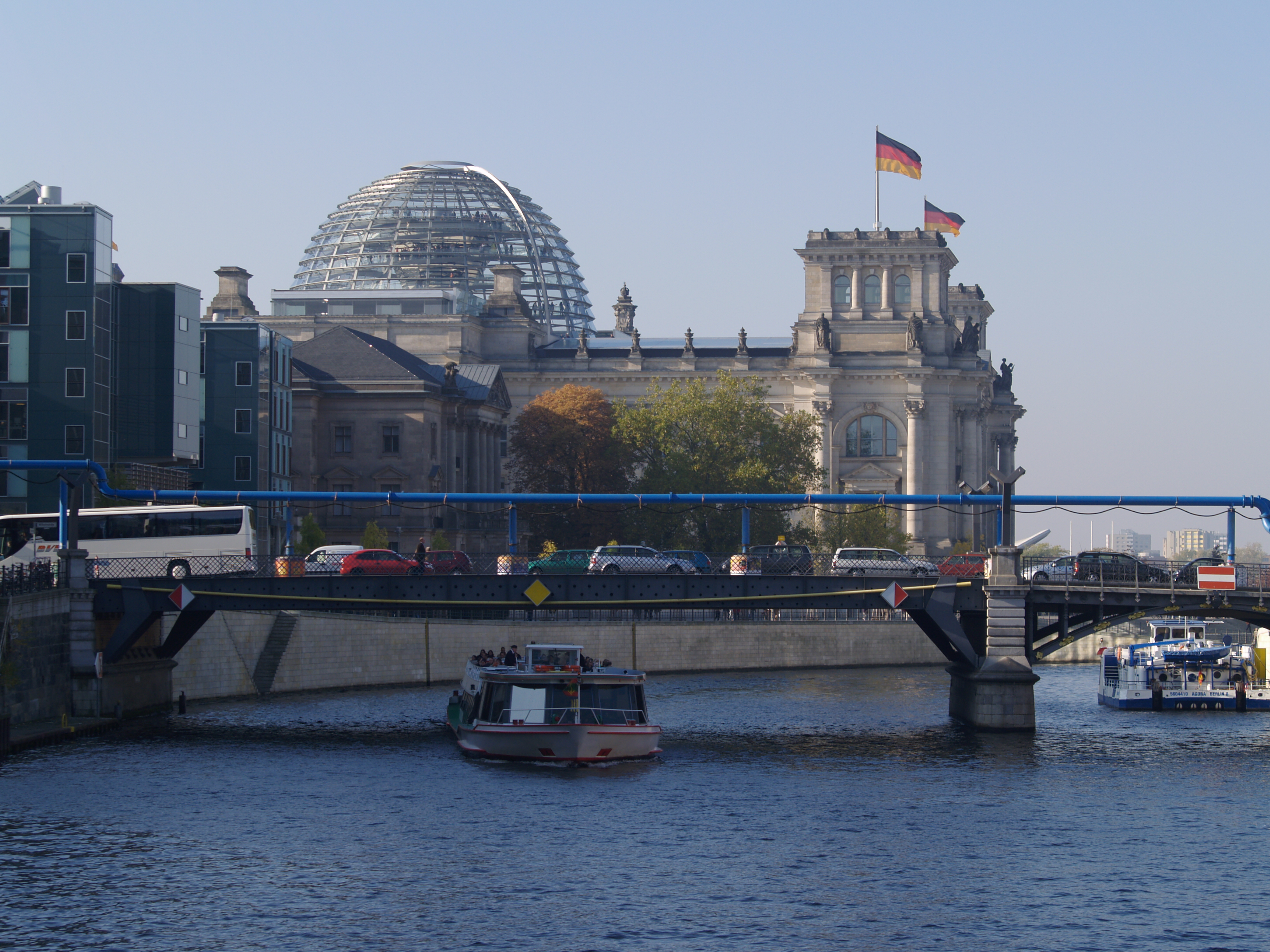 Reichstag cupola and east side with waterfront of the spree river